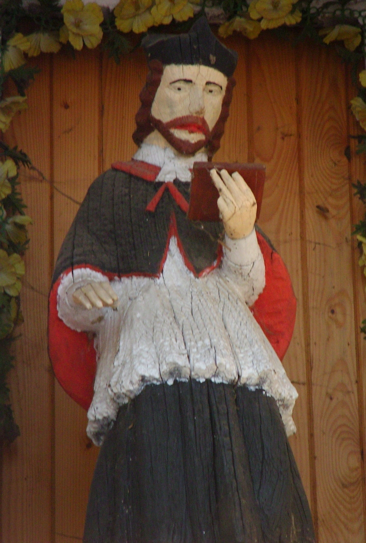 XIX wieczna figura św. Jana Nepomucena we wnęce szczytowej zabytkowej kapliczki w Racławicach koło Biecza